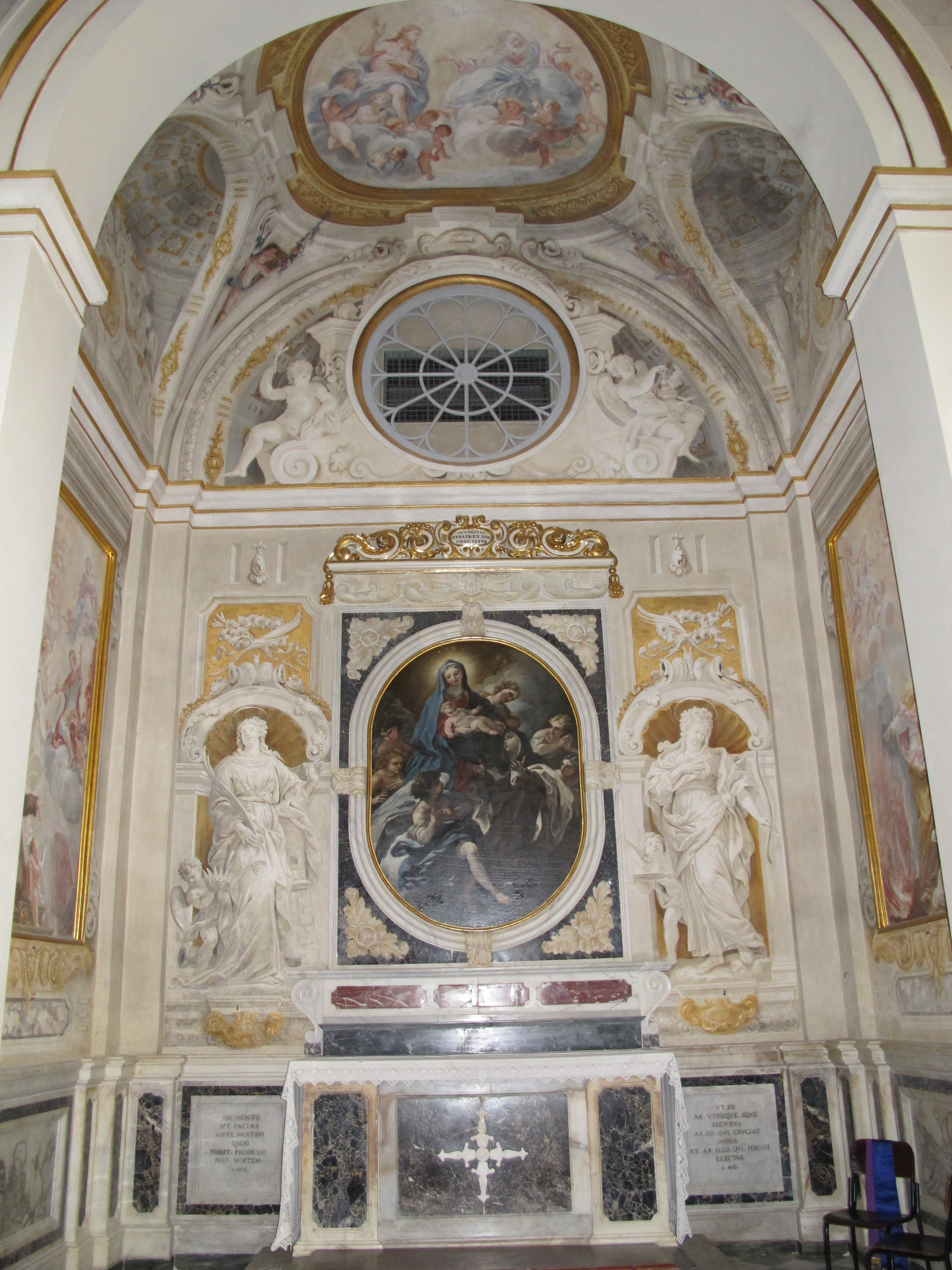 Duomo di san miniato, int., navata sx, cappella con affreschi anton domenico bamberini